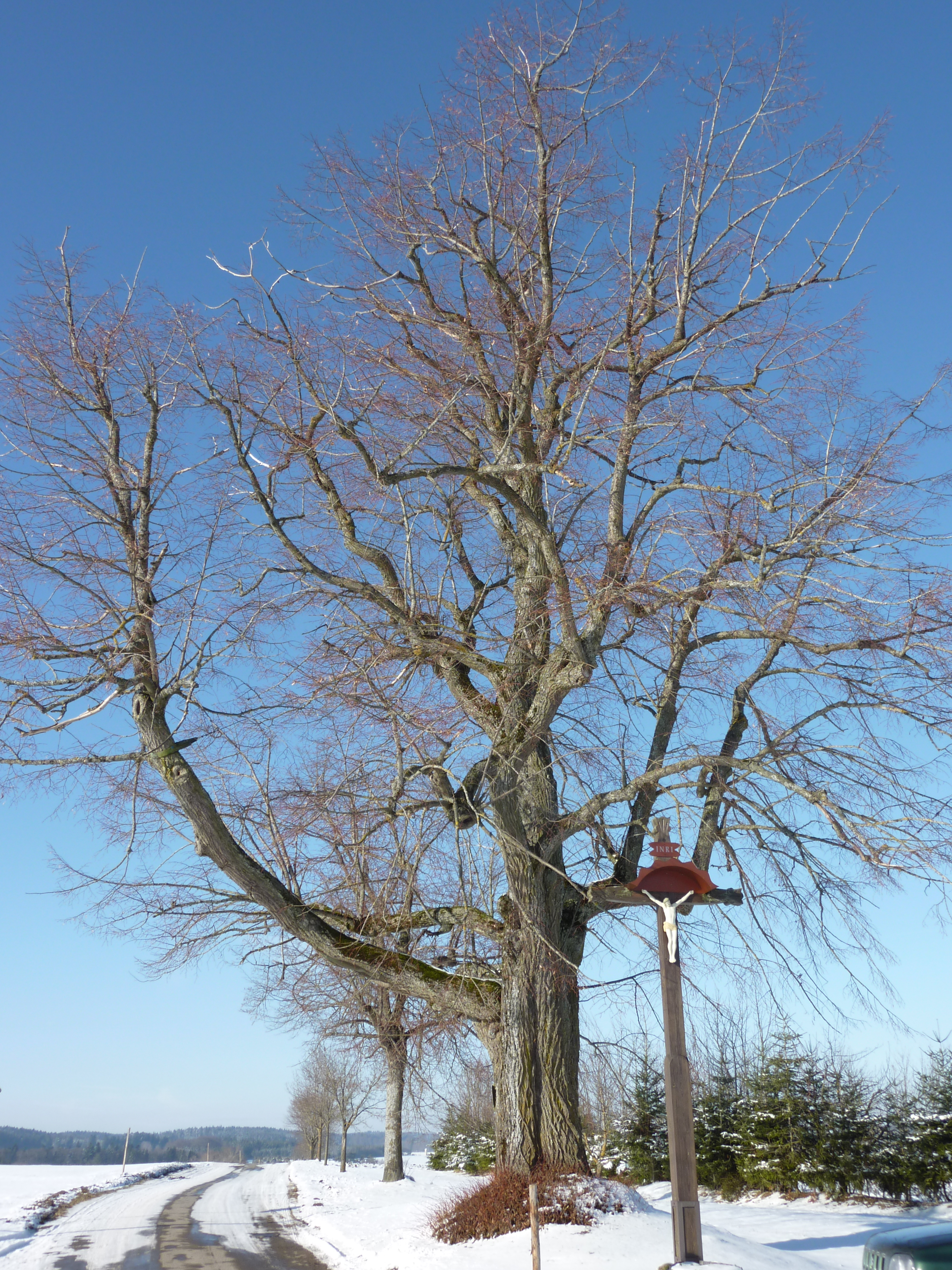 Käppelelinde am Ortsausgang von Kolbingen Richtung Renquishausen; Naturdenkmal NDE 83270300001, Info